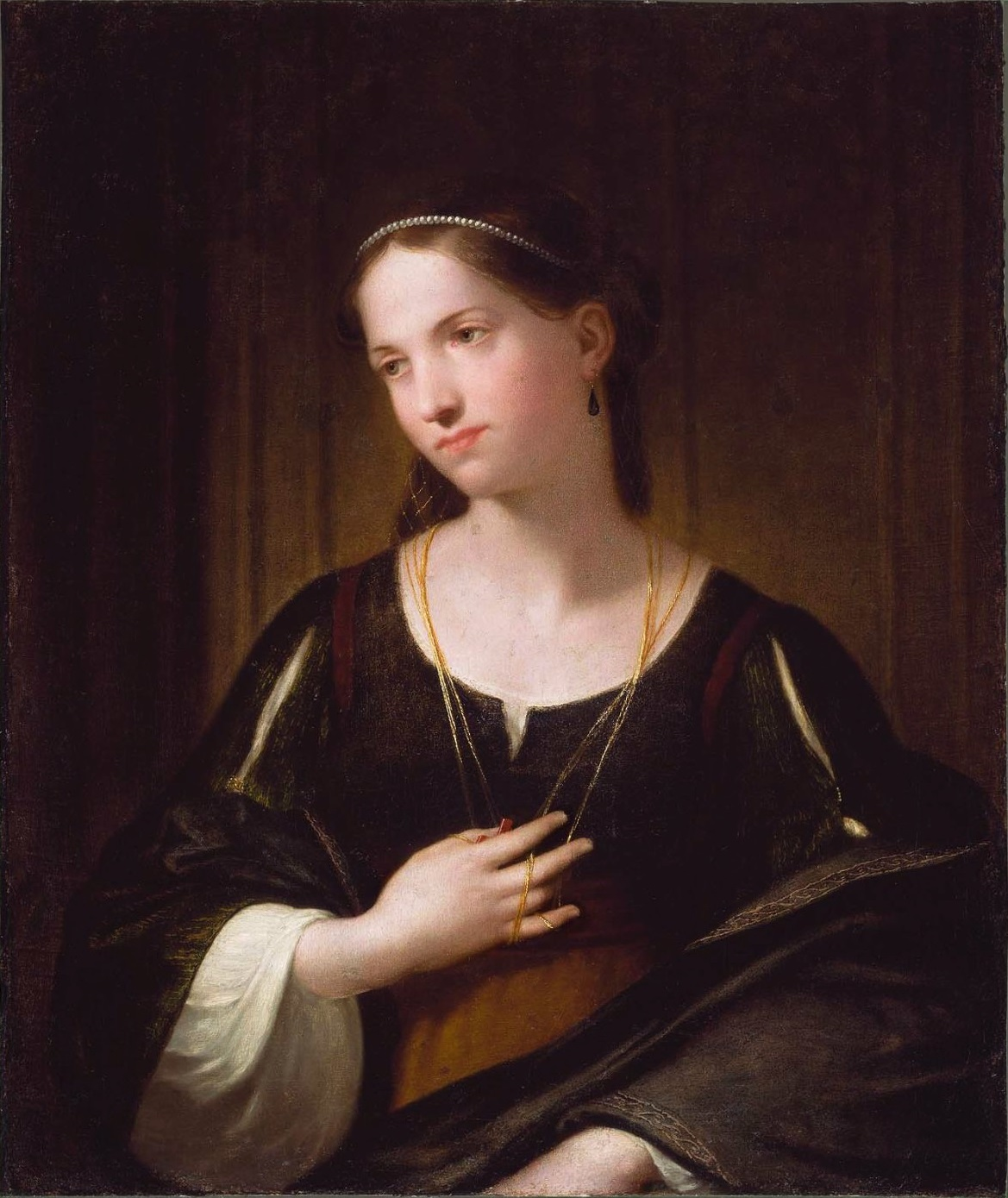 Beatrice Portinari